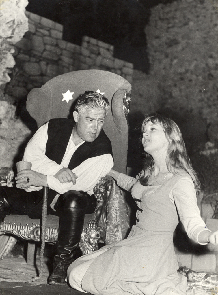 Anton Novačan, Herman Celjski, Slovensko ljudsko gledališče Celje. Na fotografiji: Janez Škof (Herman II. Celjski), Minu Kjuder (Veronika Deseniška).